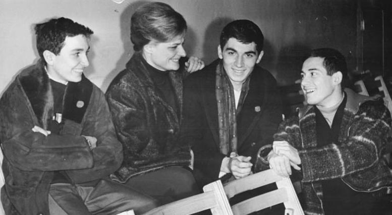 Zentralbild Studré 14.11.1964 Berlin: Internationaler Verbandspokal des DELV Nach dem Trainig am 13.11.1964 in der Werner-Seelenbinder-Halle ist die französische Trainerin Marianne toutai-Renault offensichtlich mit der Leistung ihrer Schützlinge zufrieden. Nach dem Pflichtlaufen am Vorteg nehmen die Franzosenn (vlnr) folgende Plätze ein: 2. patrick Pera, 1. robert Dureville und 5. Philippe Pelesier.